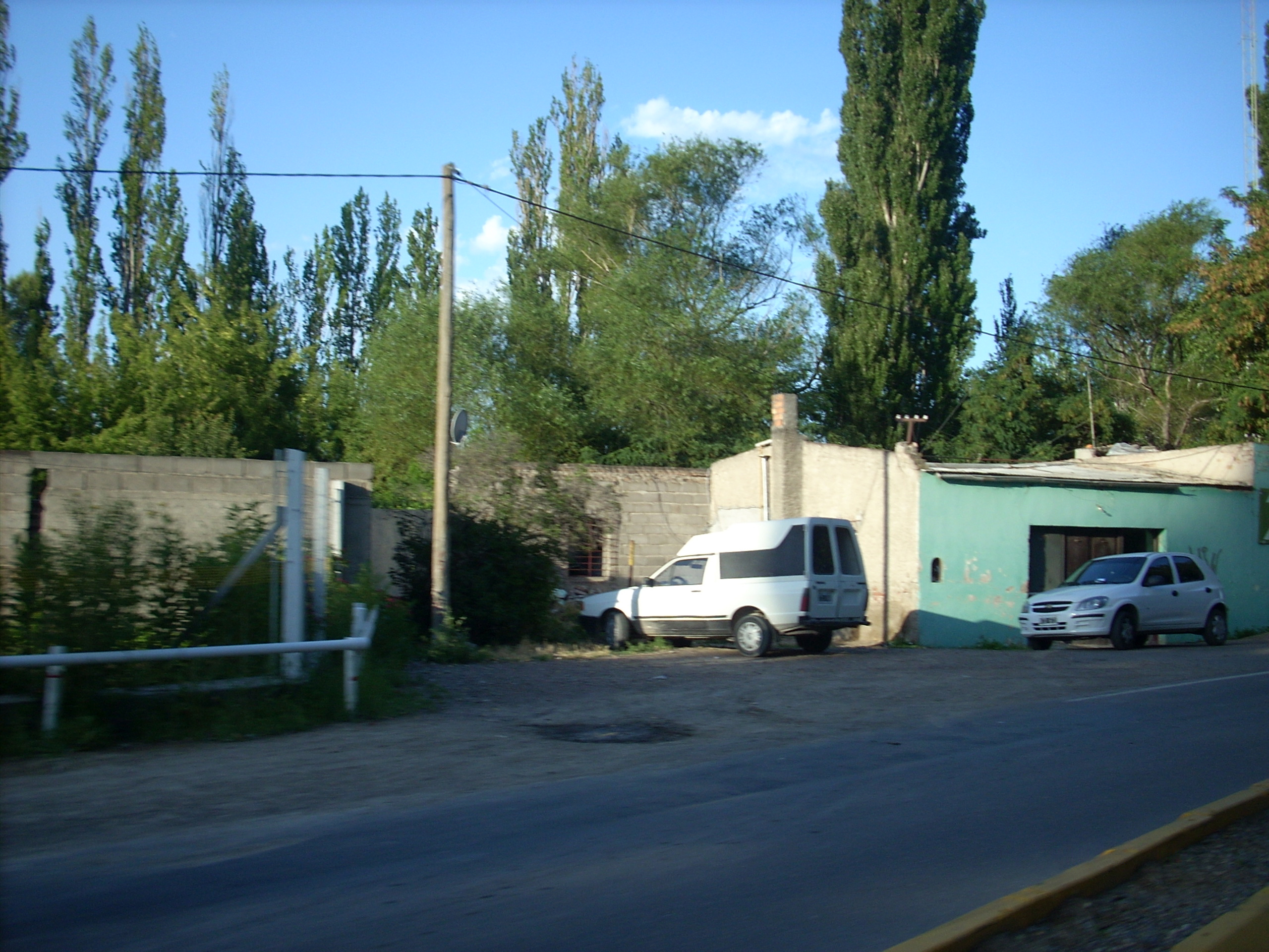 Caserío del Puente Hendre